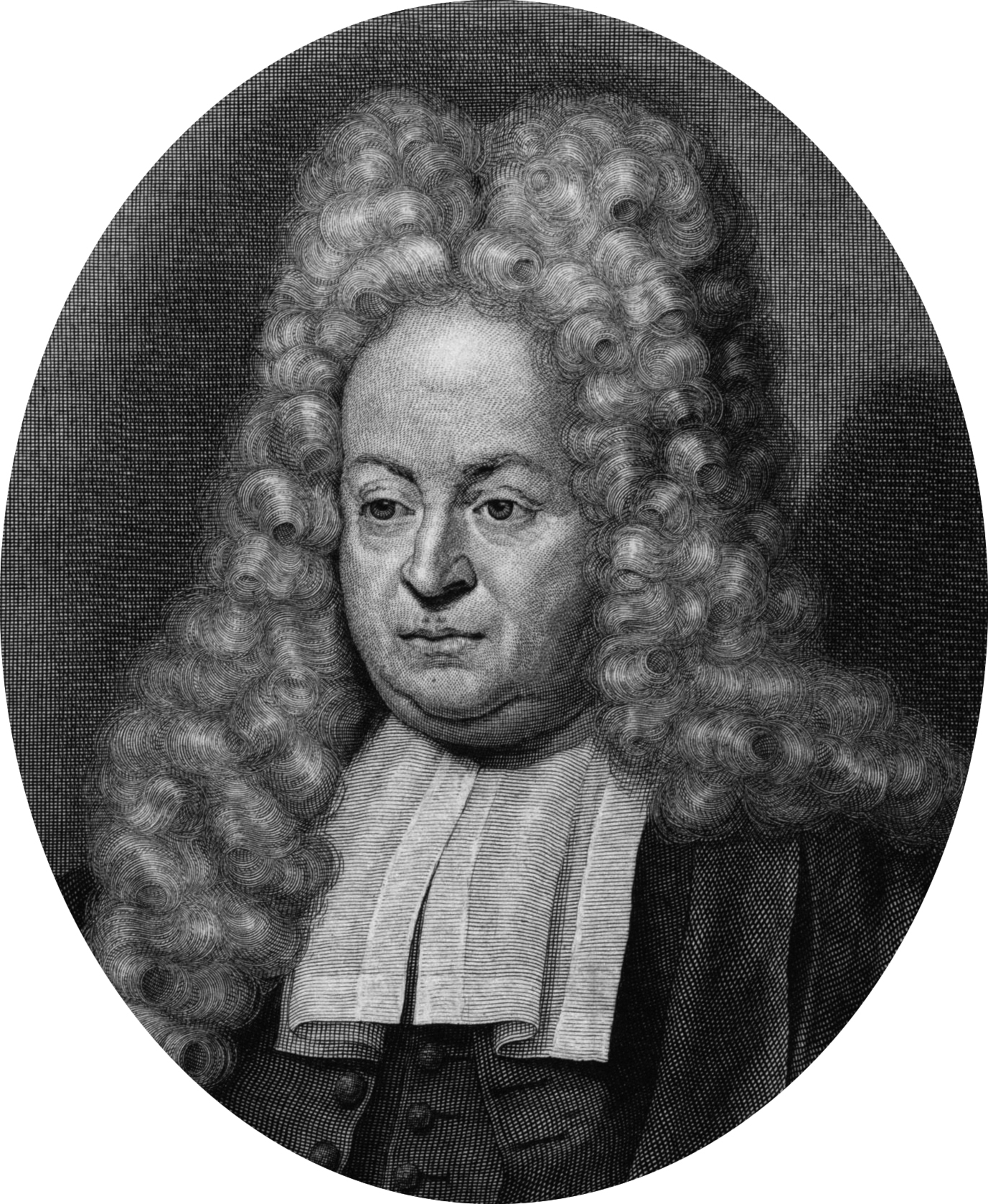 Jan Trip (31-10-1664 / 044-12-1732) Heer van Berkenrode, Burgemeester van Amsterdam 1707-1731 bewindhebber VOC.